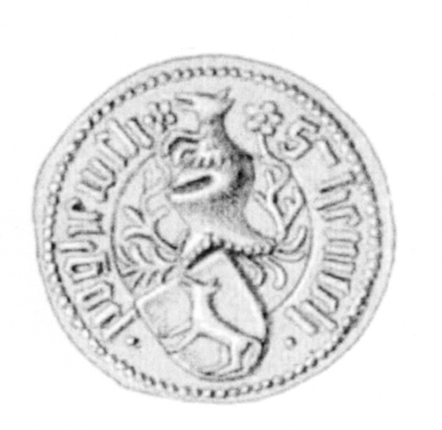 Siegel des Knappen Henning Pogwisch. Das Siegel stammt aus der Zeit um 1469.